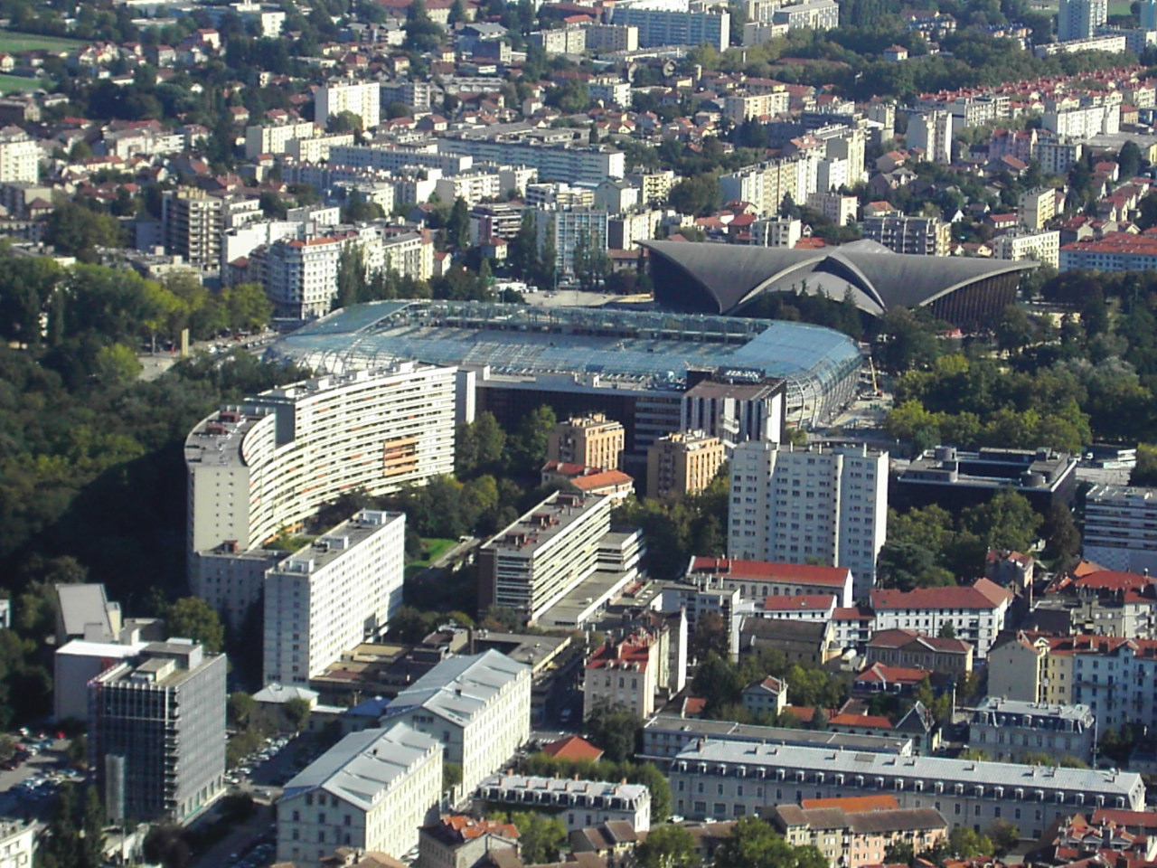 Stade des Alpes et palais des Sports depuis la Bastille de Grenoble